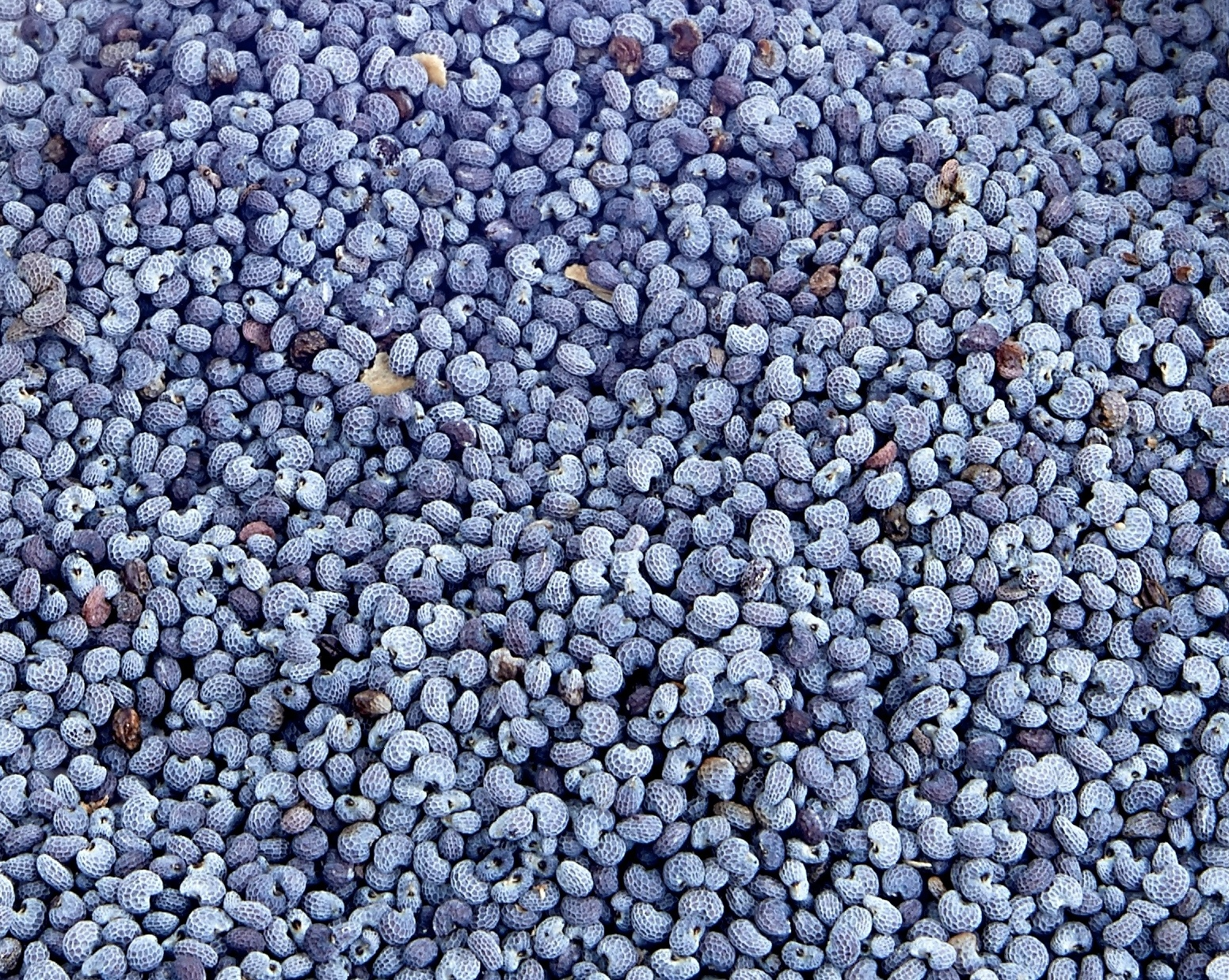 český modrý mák - detail semene